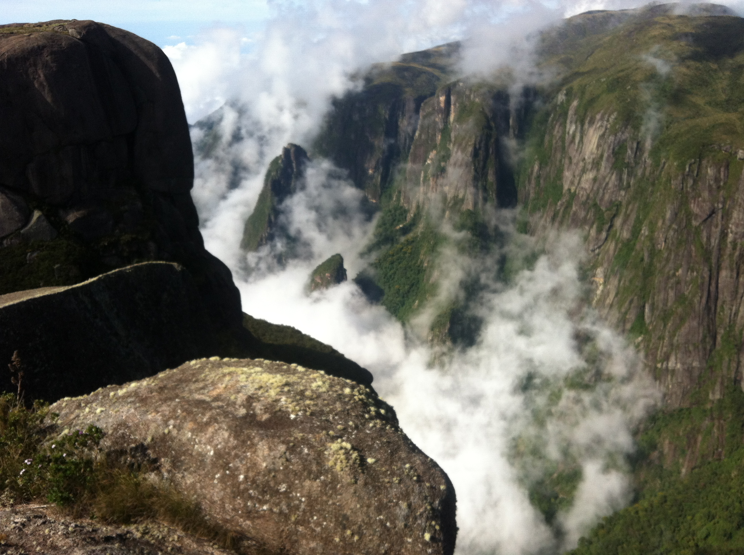 Chácara Entrerios, Guapimirim - RJ, Brazil